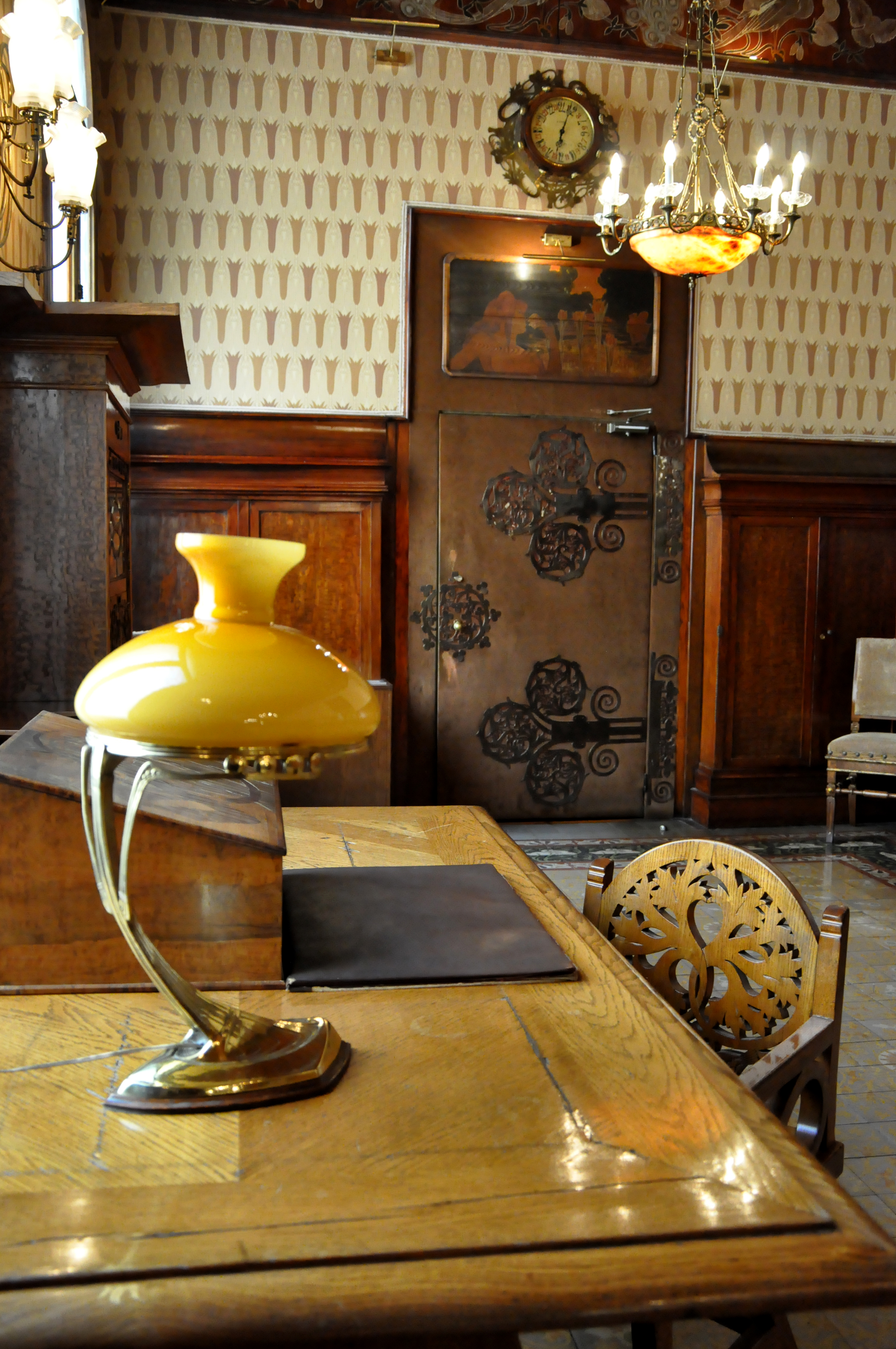 Sala Alexandre de Riquer del Cercle del Liceu